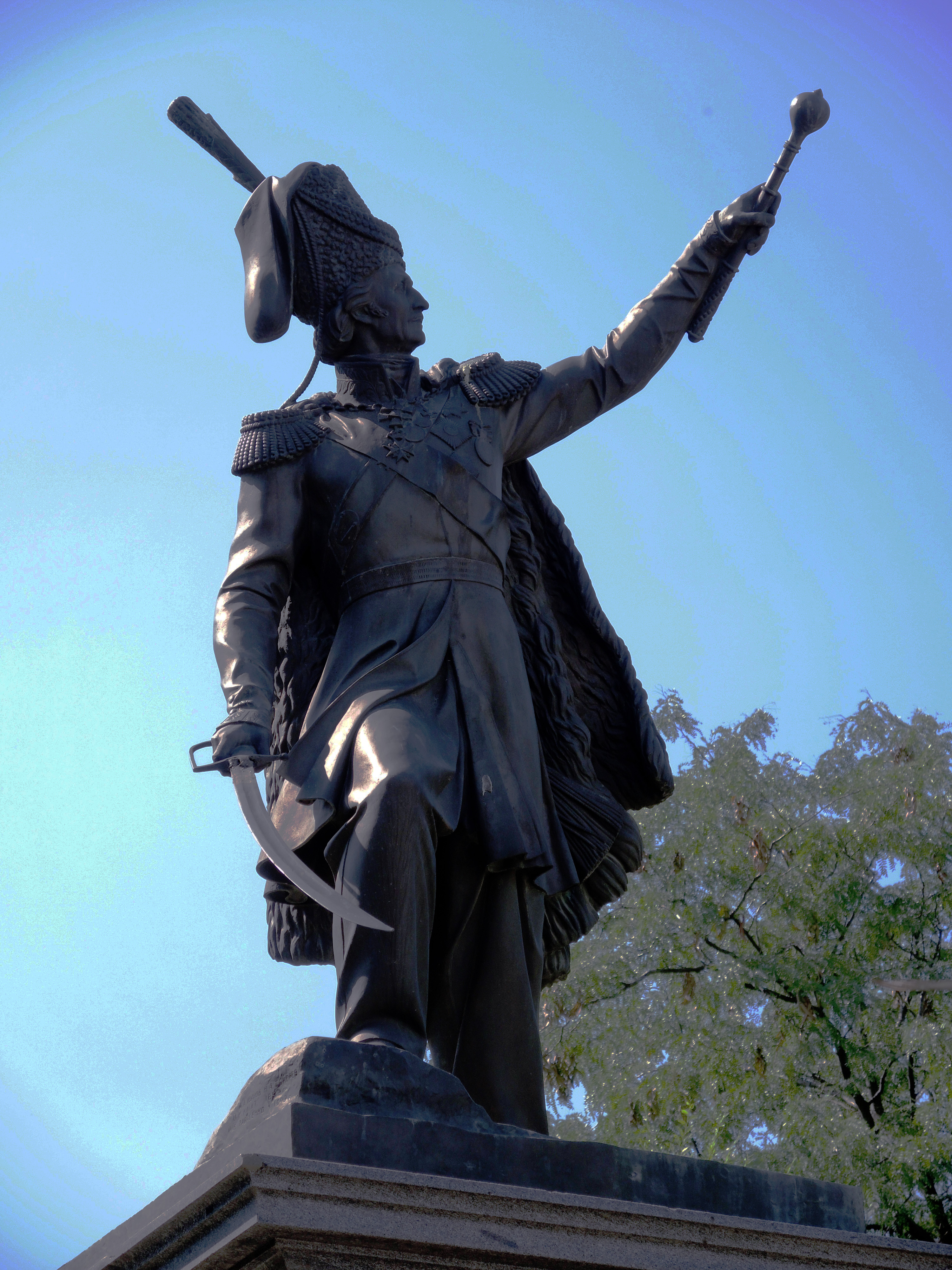 Памятник М.И. Платову: площадь Ленина, Новочеркасск, Ростовская область